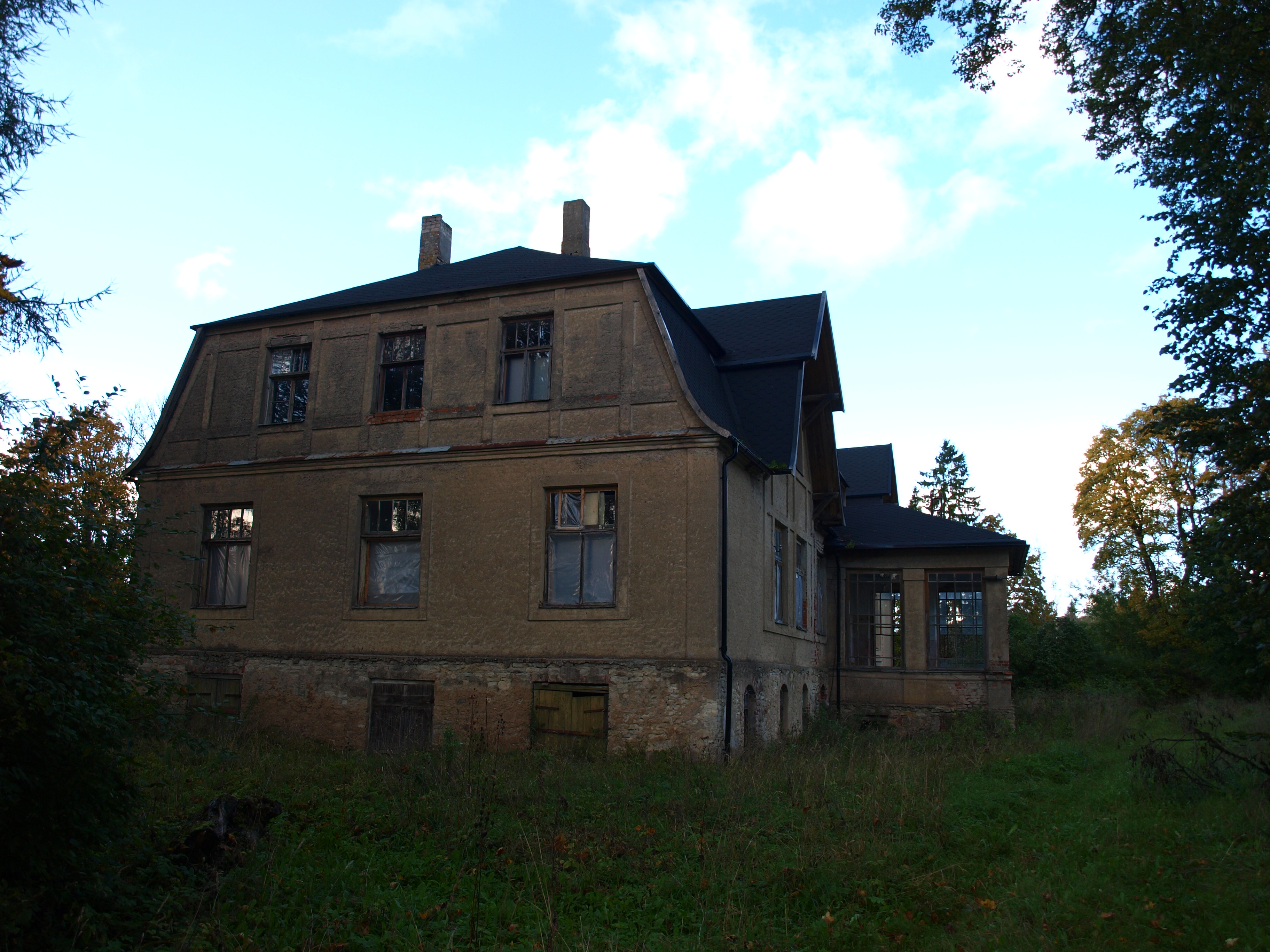 Mõisa peahoone pildistatuna maantee poolt.